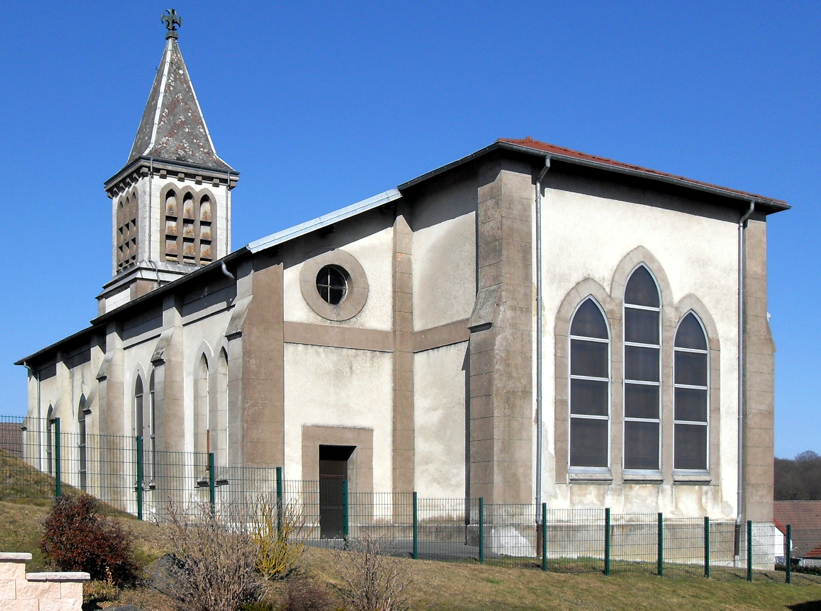 L'église Saint-Pierre à Dampierre-les-Bois